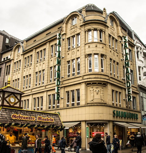 Wohnhaus von Dr. Max Frank u. Dr. Otto Elias in der Hansastr. 50